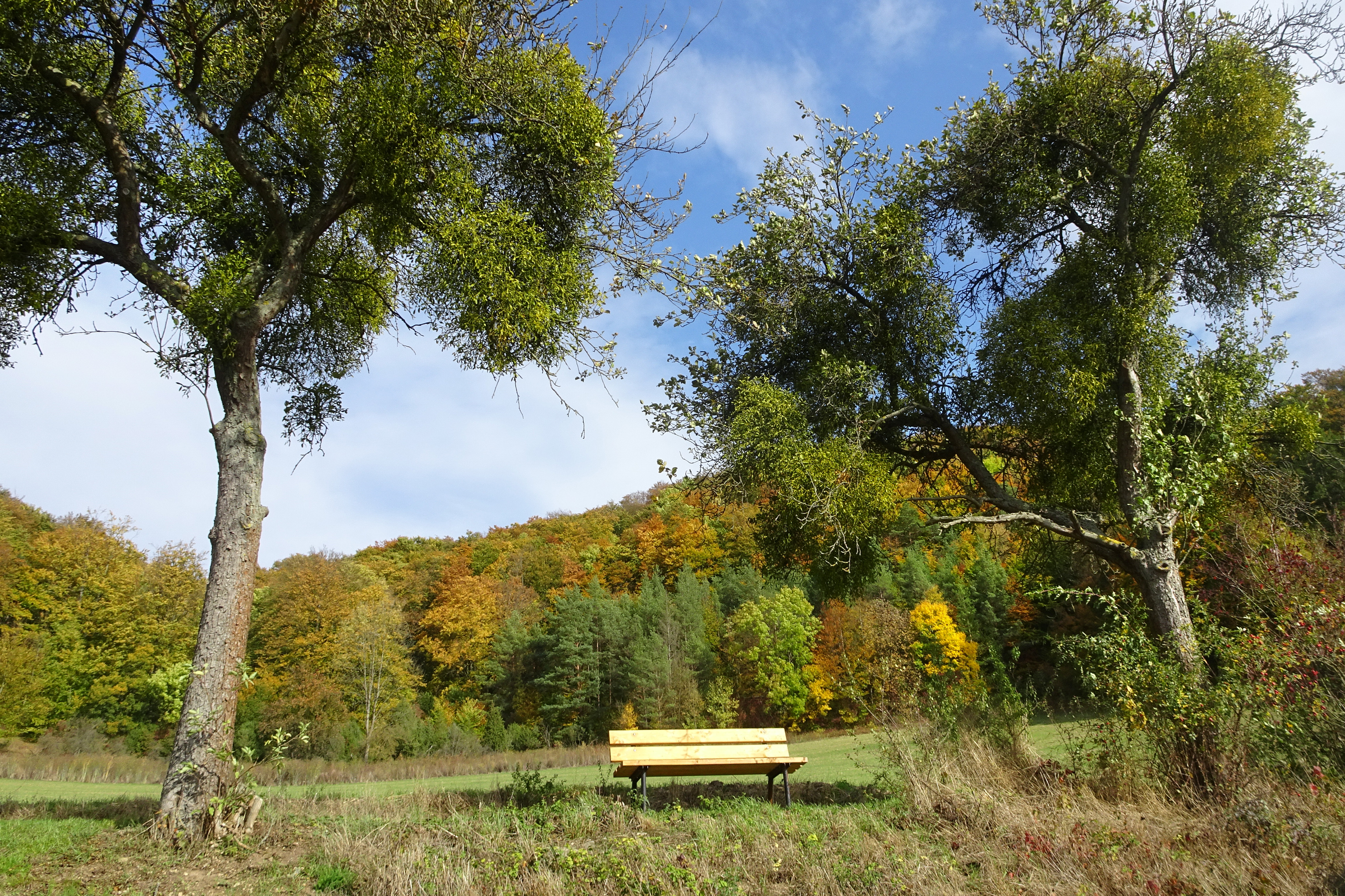 Der Iberg bei Markershausen ist eine 434 m hohe Erhebung am südlichen Rand des Ringgau-Hochplateaus im nordhessischen Werra-Meißner-Kreis. Auf den flachgründigen Böden nehmen artenreiche Laubmischwälder mit einer reichen Bodenflora den größten Teil des Gebietes ein. Um diesen wertvollen Lebensraum, mit den hier lebenden Tier-und Pflanzenarten zu erhalten, wurde der Südwesthang im Jahr 1988 als Naturschutzgebiet ausgewiesen und seit 2008 ist er auch Teil des Flora-Fauna-Habitat-Gebiets „Wälder und Kalkmagerrasen der Ringgau Südabdachung“.